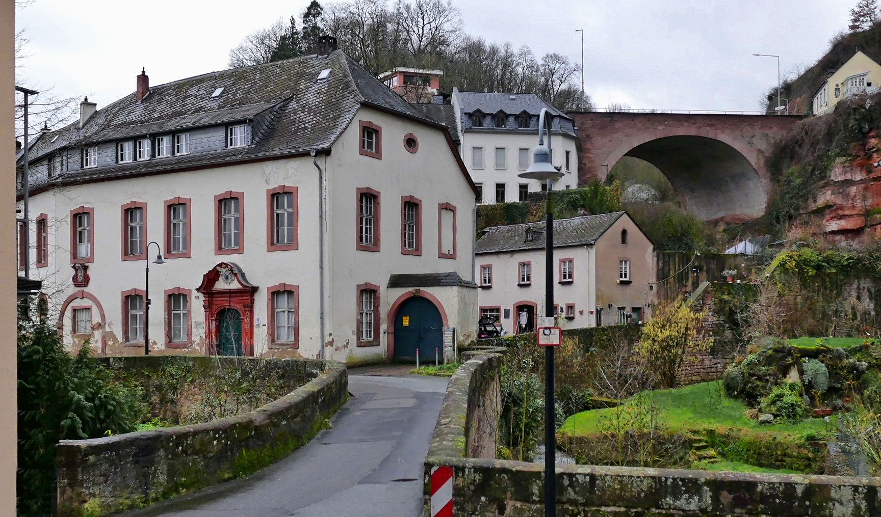 Trier-Pallien: Ehemaliger Martinerhof, Hofgut des Martinsklosters in Trier